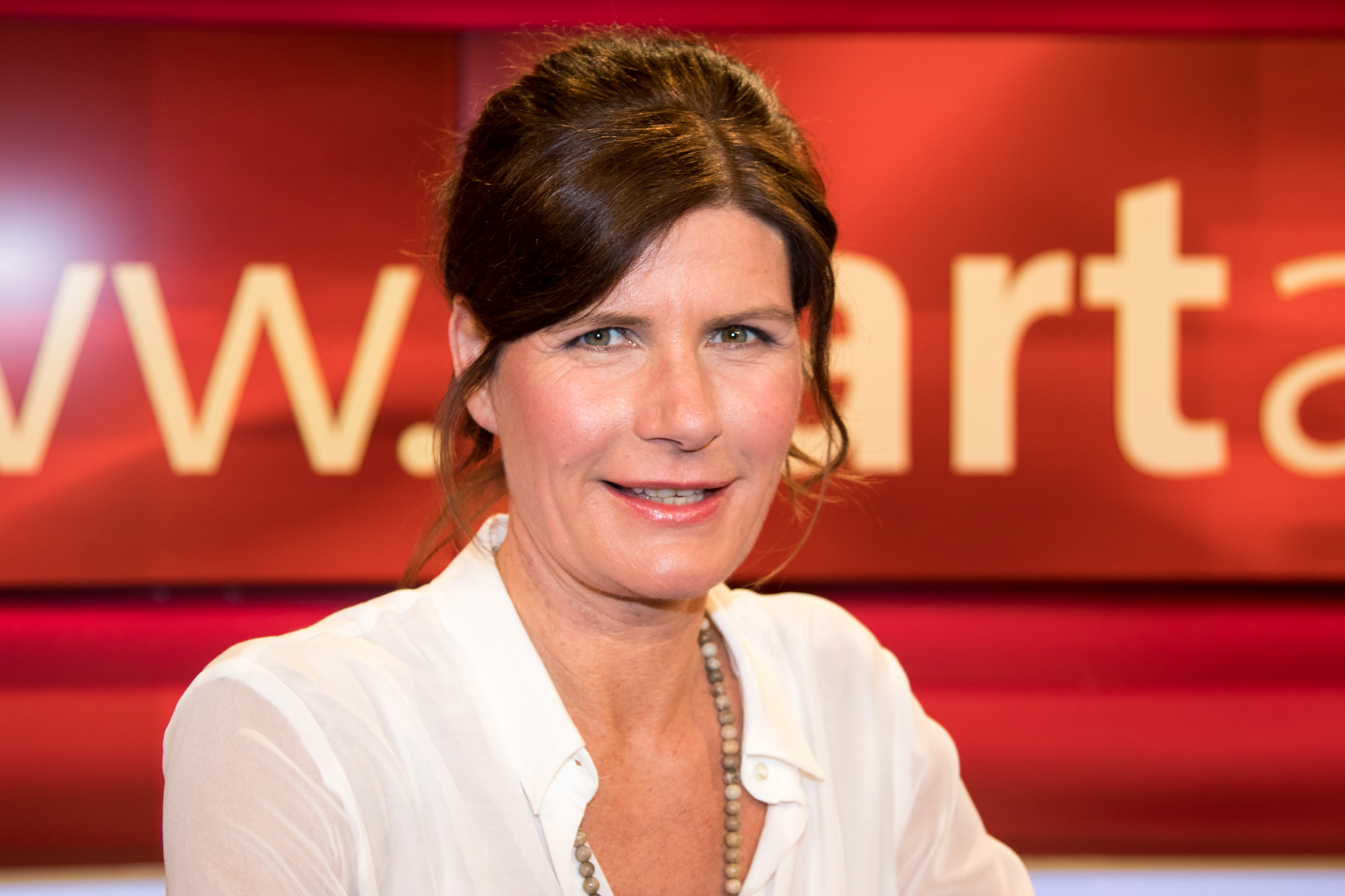 Claudine Nierth (Bundesvorstandssprecherin des Vereins “Mehr Demokratie”) in der WDR-Sendung "hart aber fair" am 31.10.2016